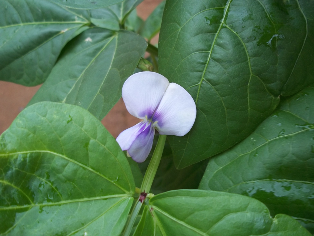 Flor de caraotas o frijol Phaseolus vulgaris (flowers)